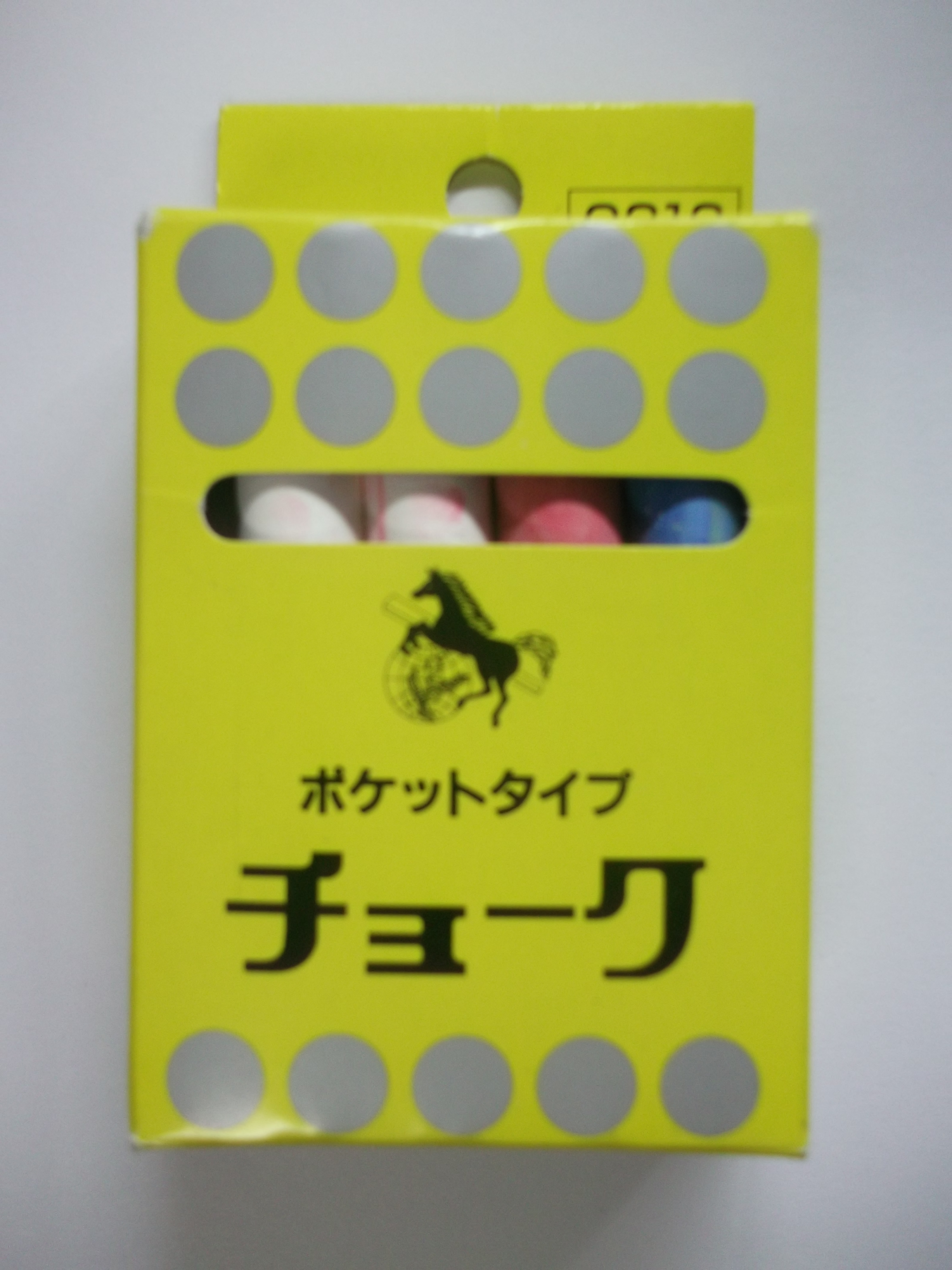 名古屋市に本社がある馬印製の焼き石膏チョーク。「C310」